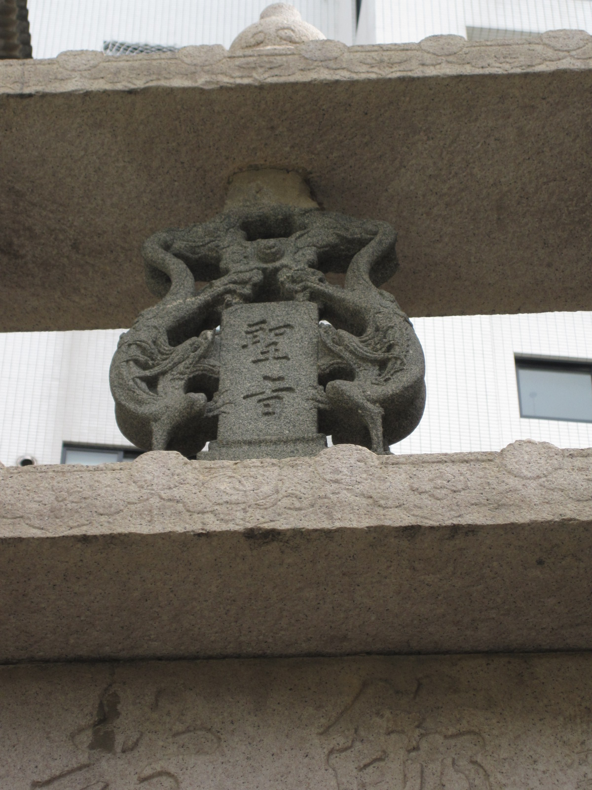 臺南市蕭氏節孝坊上的聖旨牌